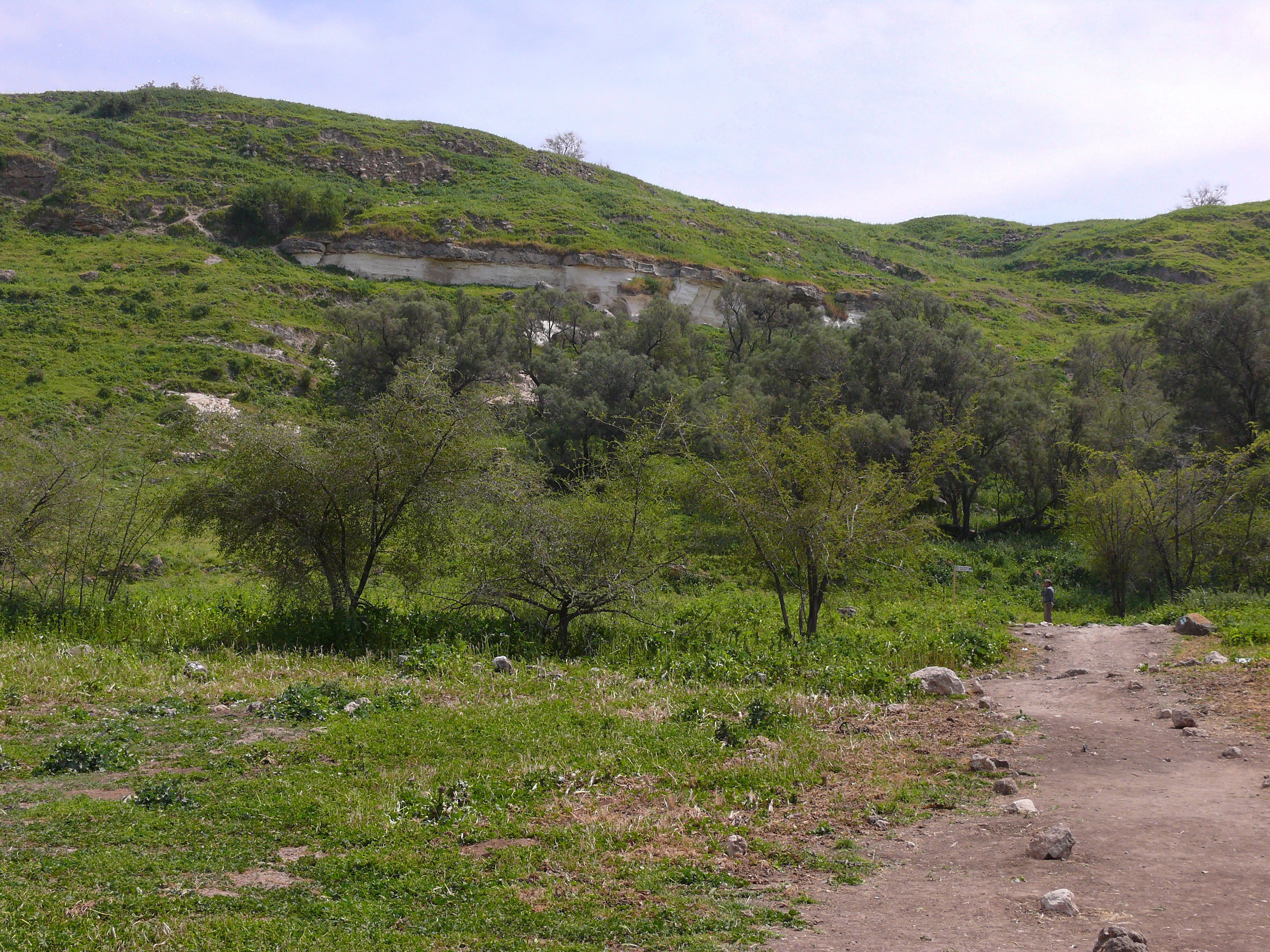 Tel Zafit, Israel תל צפית, ישראל